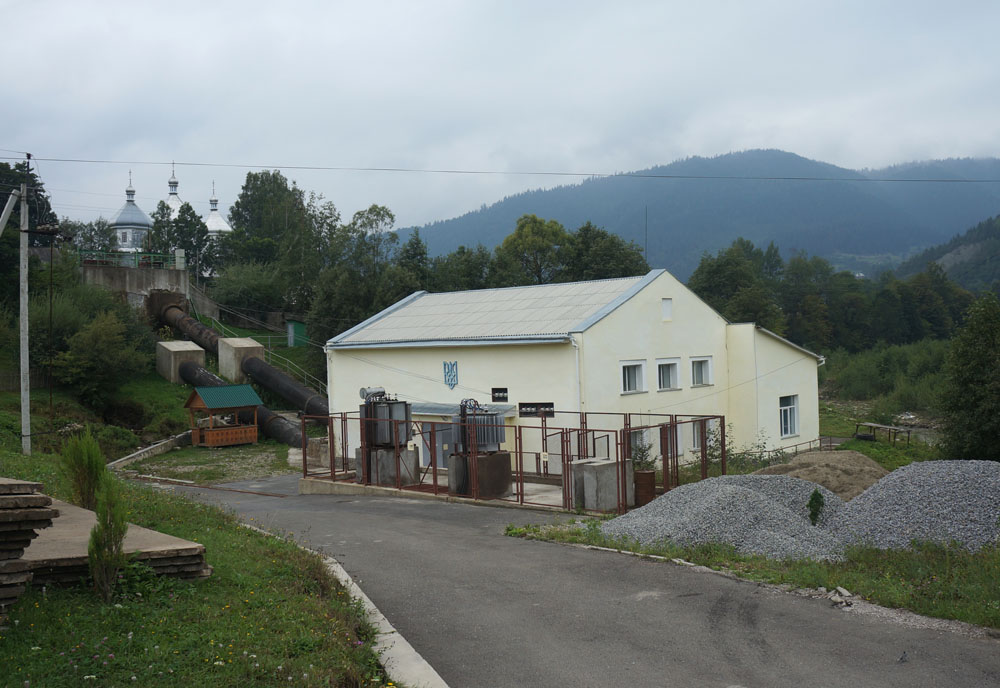 Яблуницька ГЕС, р.Білий Черемош